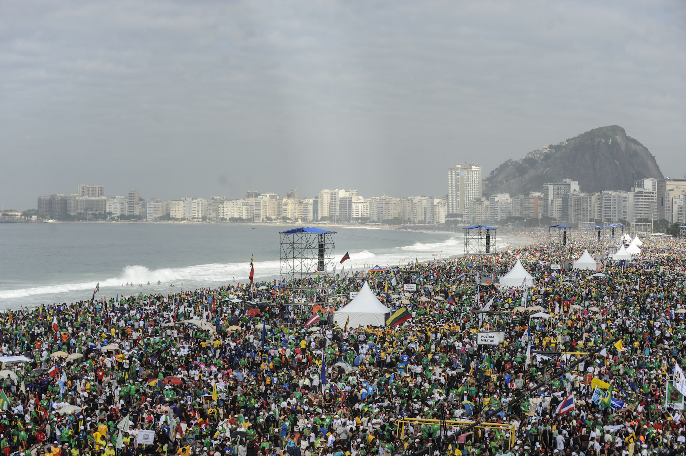 Rio de Janeiro – Um público que deve chegar a 3 milhões de pessoas, de acordo com a prefeitura do Rio, assiste o papa Francisco celebrar a Santa Missa pela 28ª Jornada Mundial da Juventude (JMJ), na praia de Copacabana